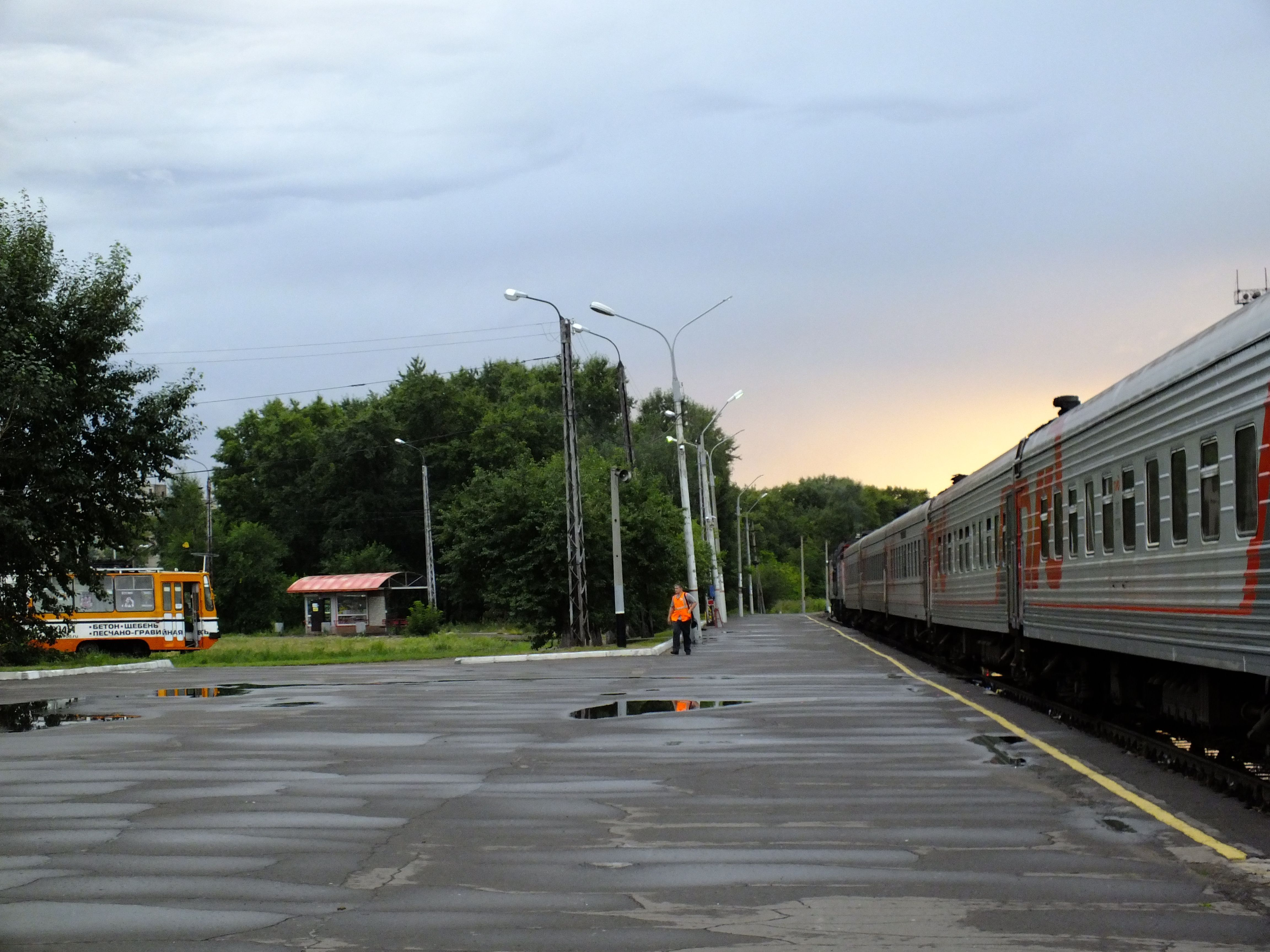 Trams in Komsomolsk-on-Amur